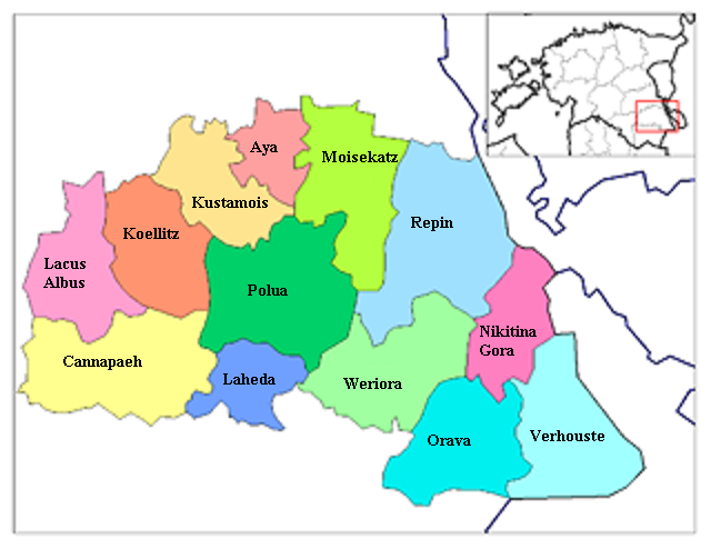 Poluae municipia Latine